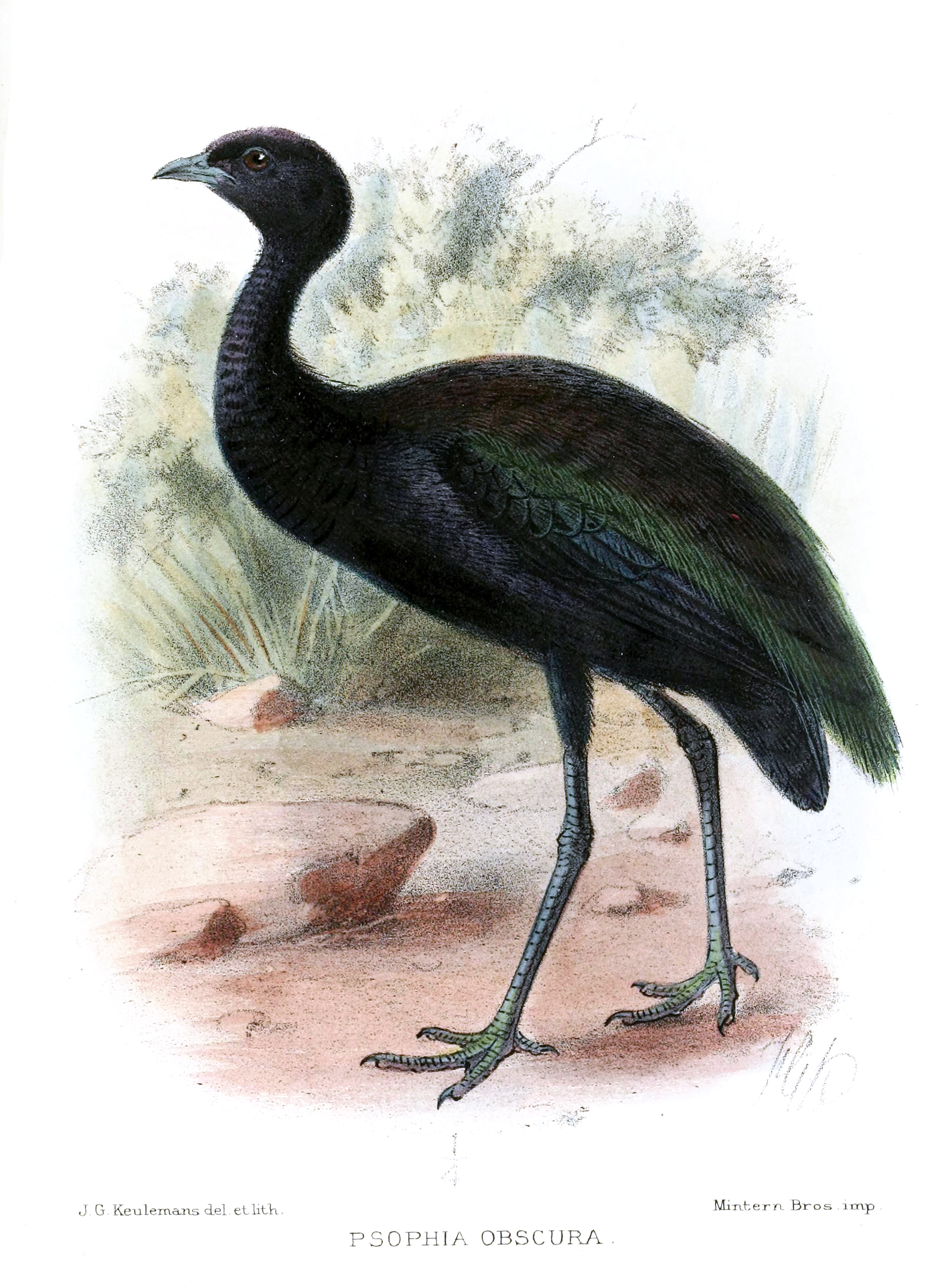 Psophia viridis obscura